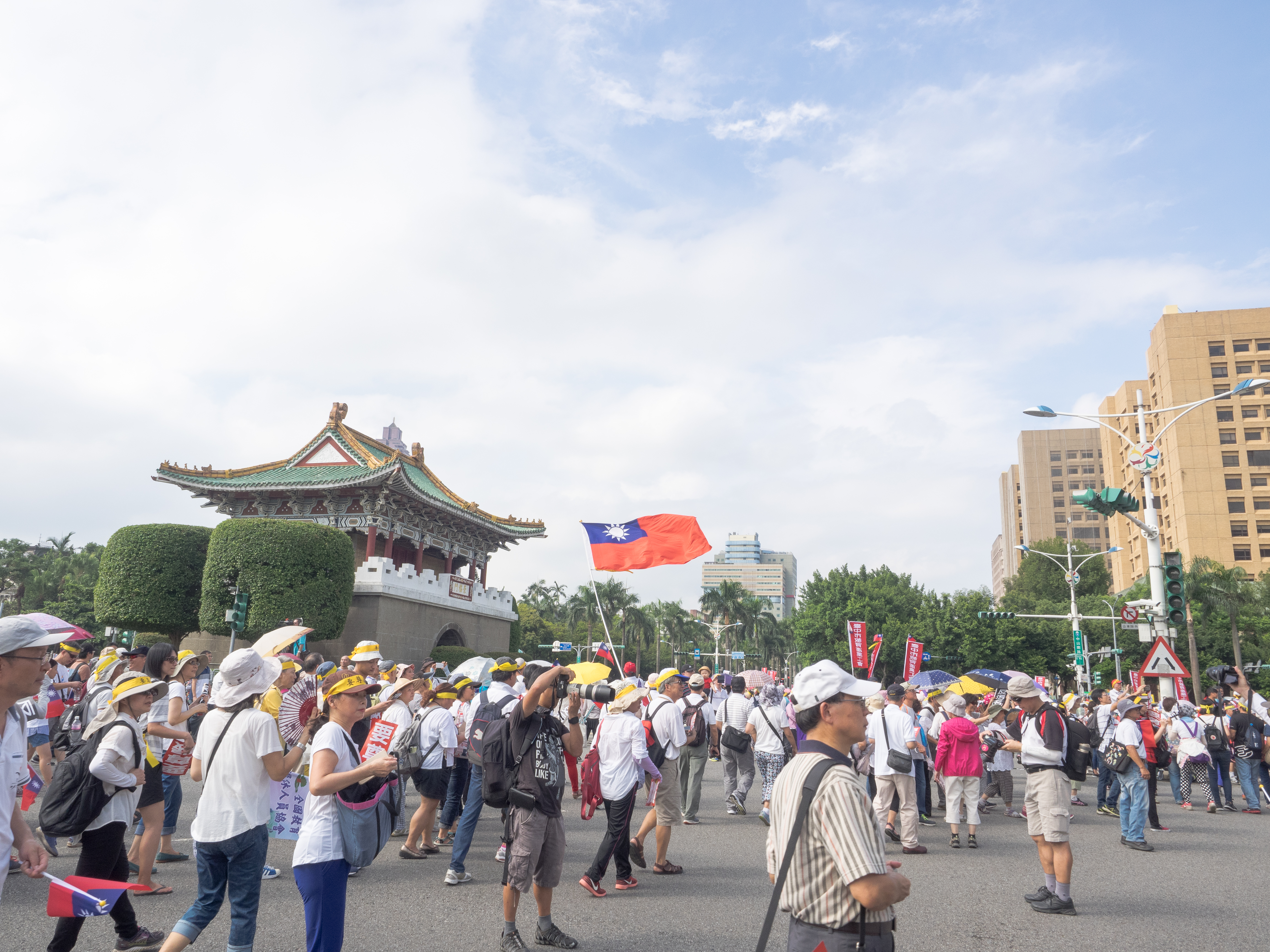 OLYMPUS DIGITAL CAMERA 2016-09-03 軍公教上街